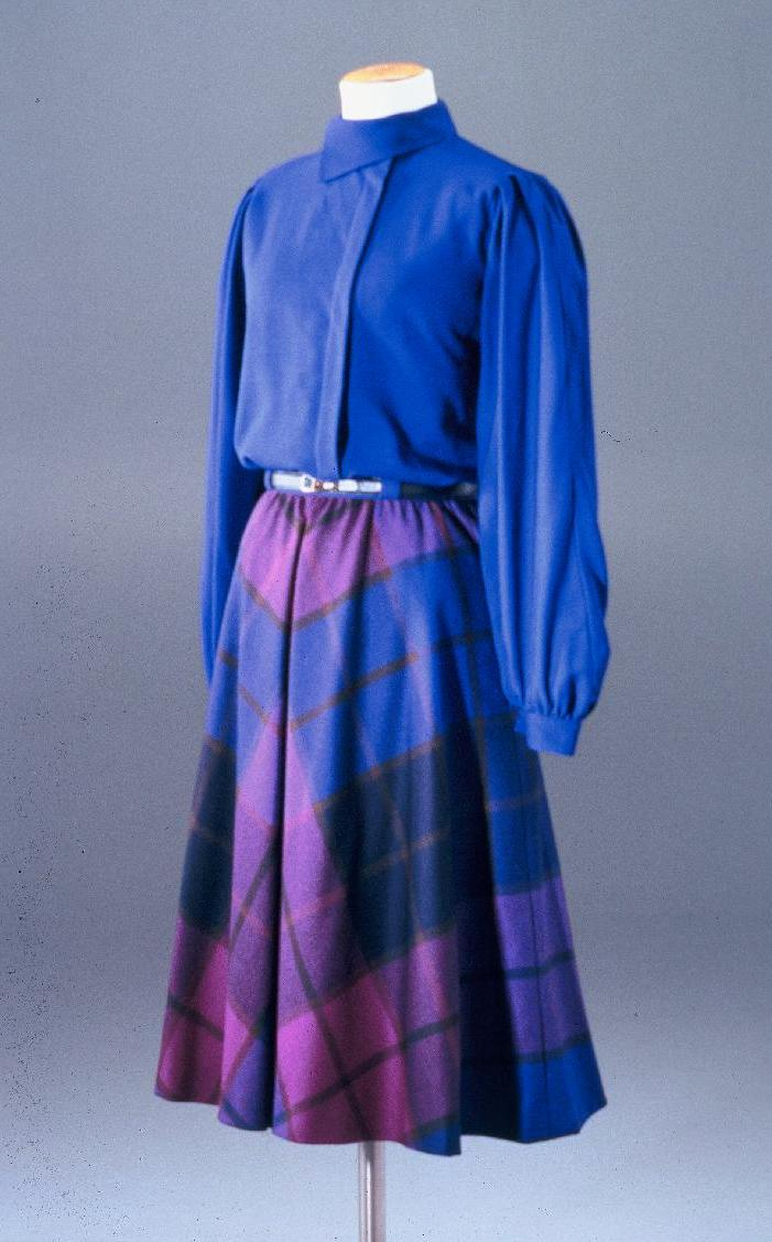 Die Kleider der ersten Schweizer Bundesrätin Elisabeth Kopp, die sie bei ihrer Bundesratswahl am 2. Oktober 1984 in Bern trug, werden in der historischen Sammlung des Schweizerischen Landesmuseums aufbewahrt. (Die Bluse und der Rock aus Schurwolle sind Werke der Modeatelier Akris, Sankt Gallen, um 1984.)